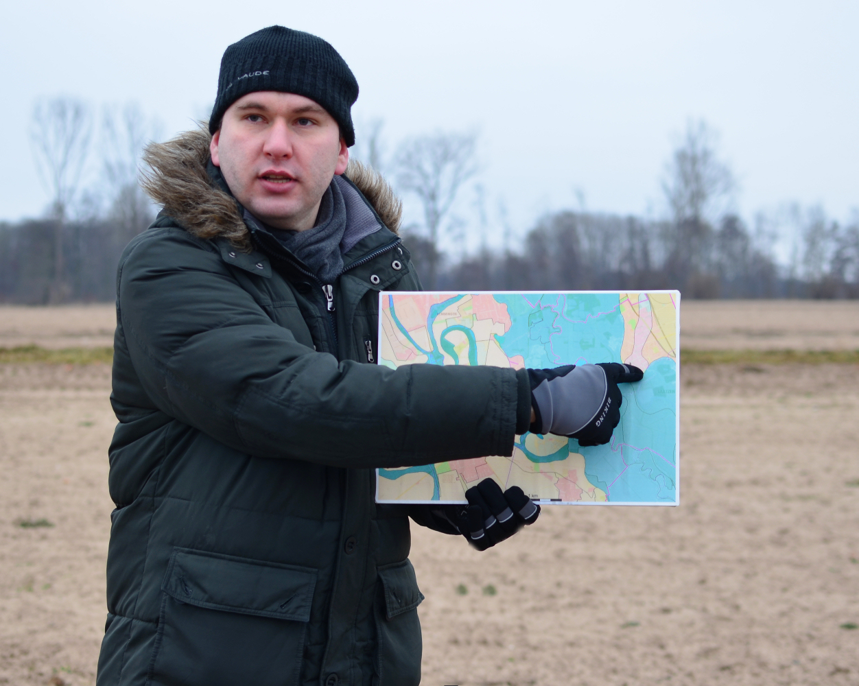 Robert Lehmann auf dem Römischen Marschlager Wilkenburg